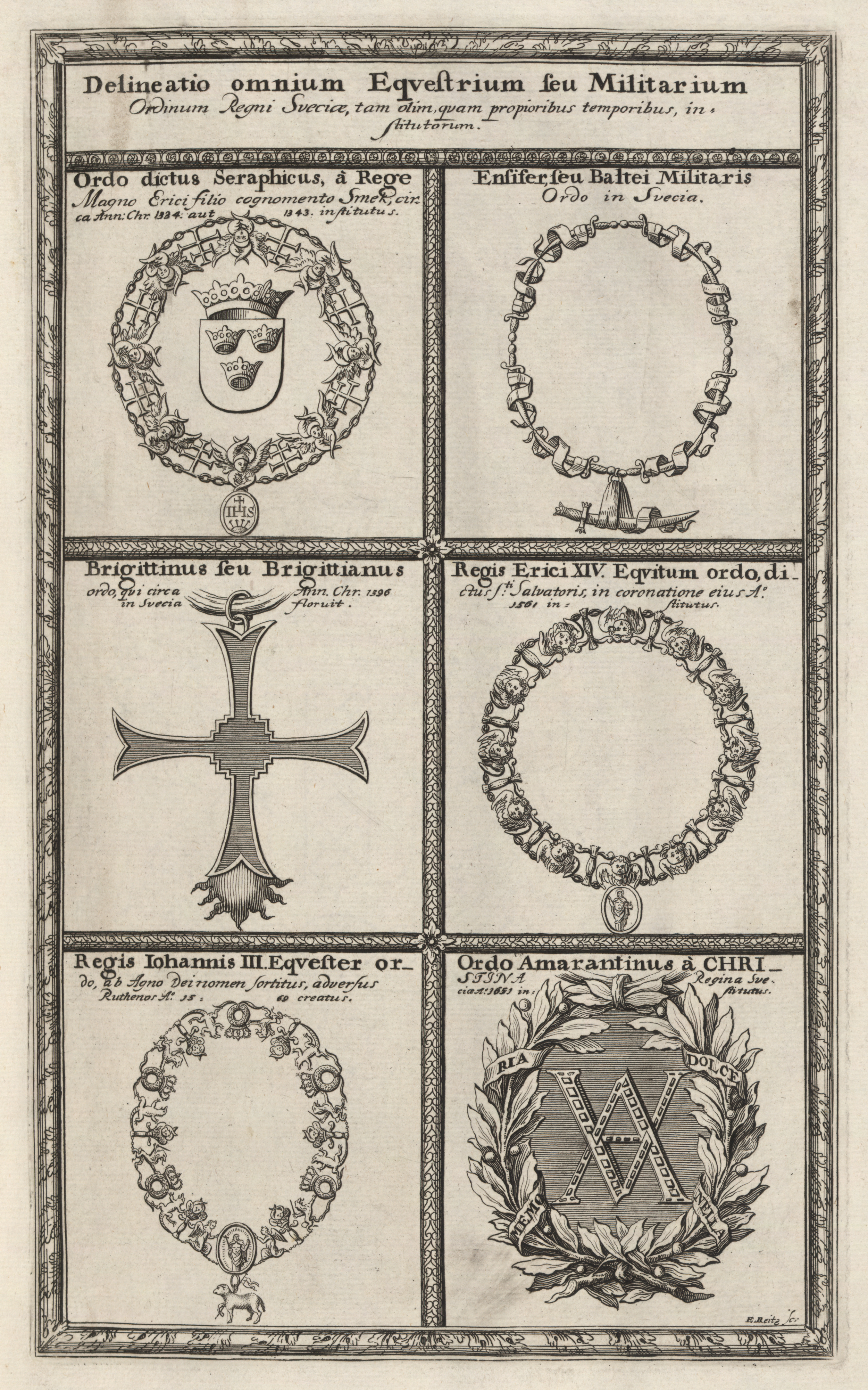 Titel i svensk övers. : Avbildning av alla ridderliga och militära ordnar i Sverige, som varit instiftade fordom eller under mera närliggande tider.